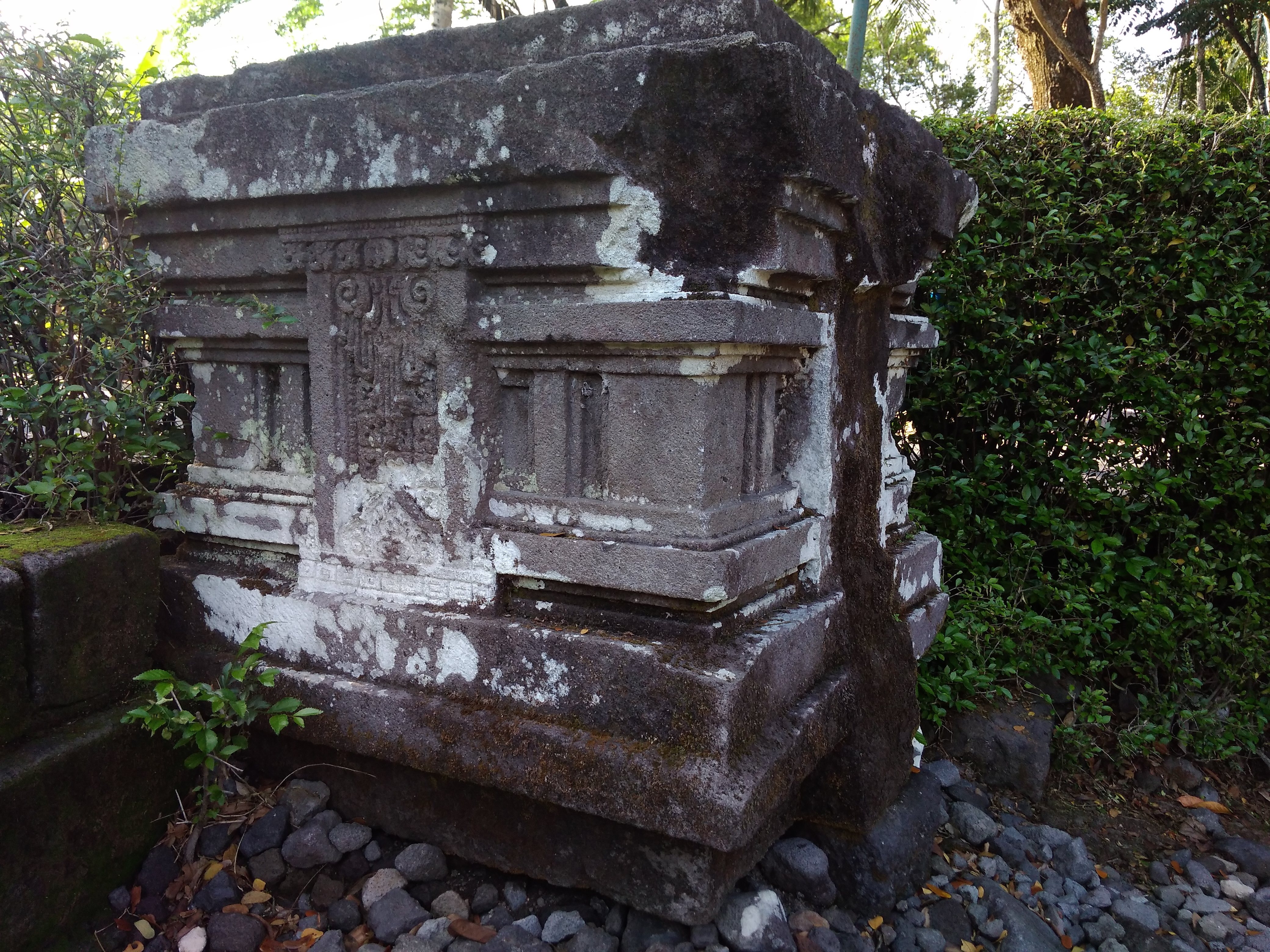 Yoni Candi Morangan